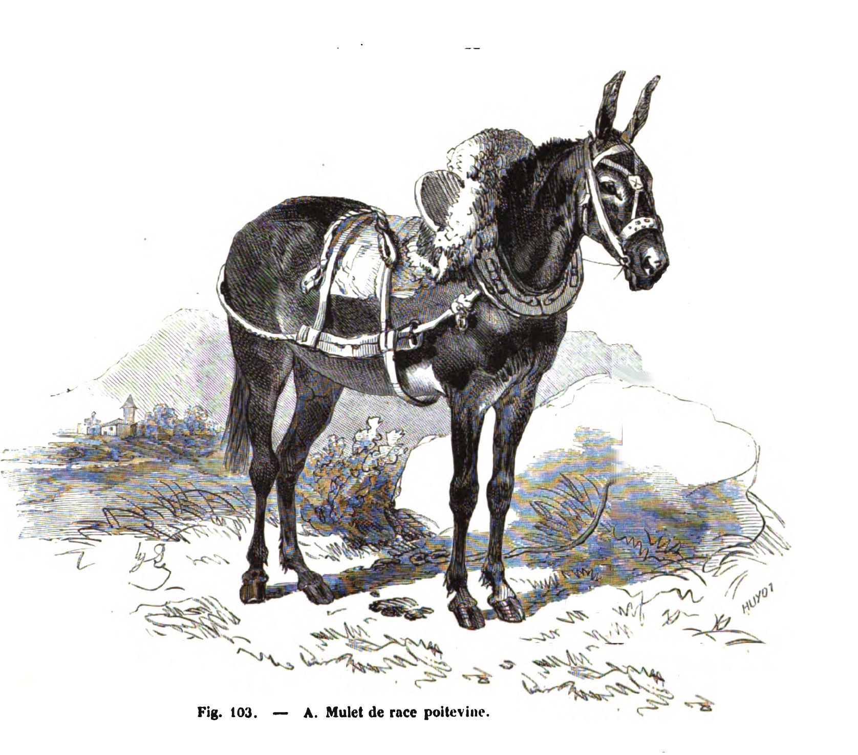 Poitevin Mule